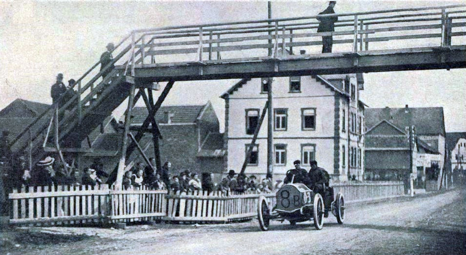 Felice Nazarro, vainqueur de la Coupe de l'Empereur en 1907 (KeiserPreiz), La Vie au Grand Air, 22 juin 1907, p. 426